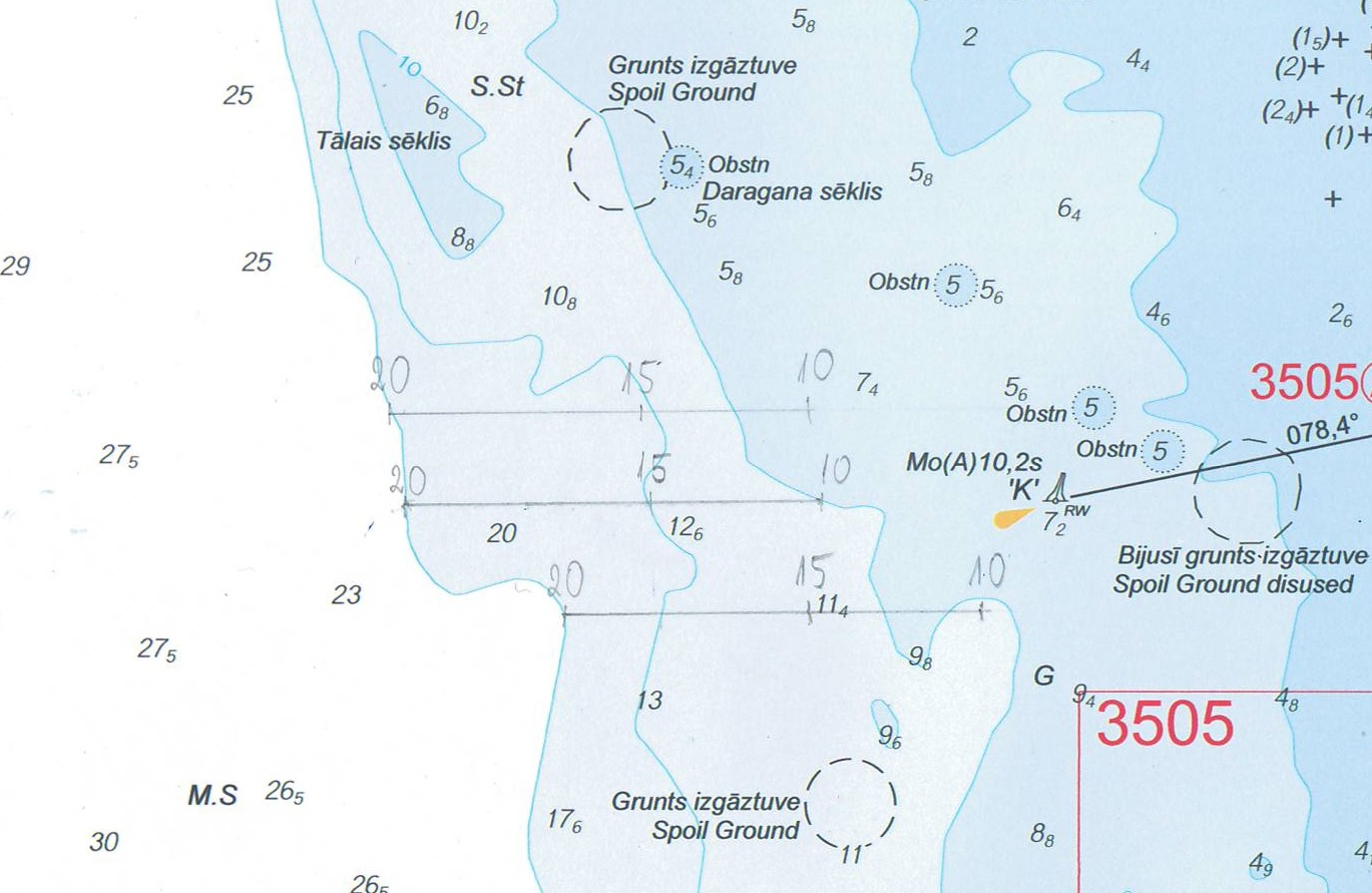 Kurss un dziļums. Bathymetry.